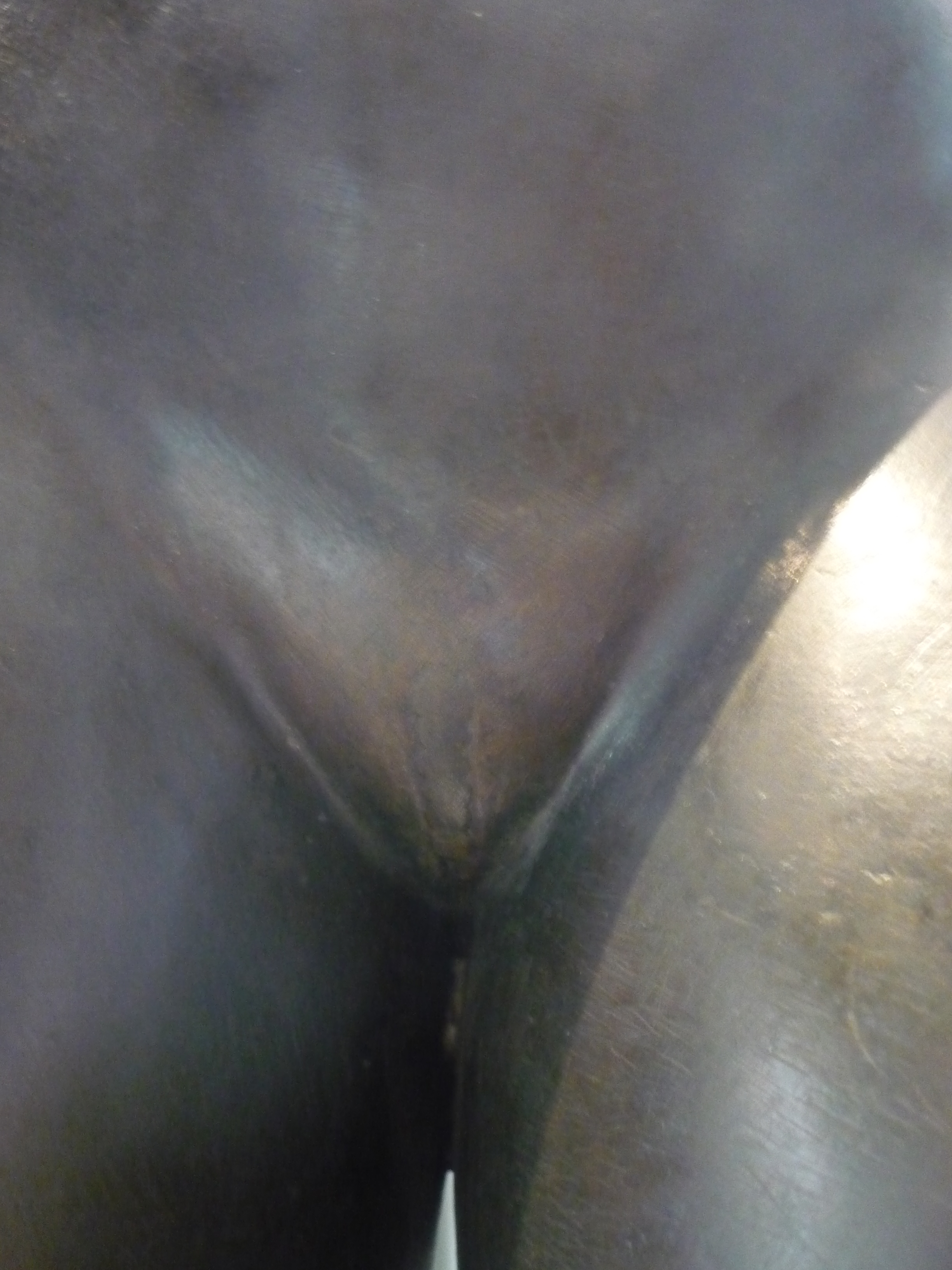 Détail du bronze de Houdon au Louvre, montrant sa partie vandalisée par des puritains qui ont bouché son bas-ventre pour faire disparaître son sexe.